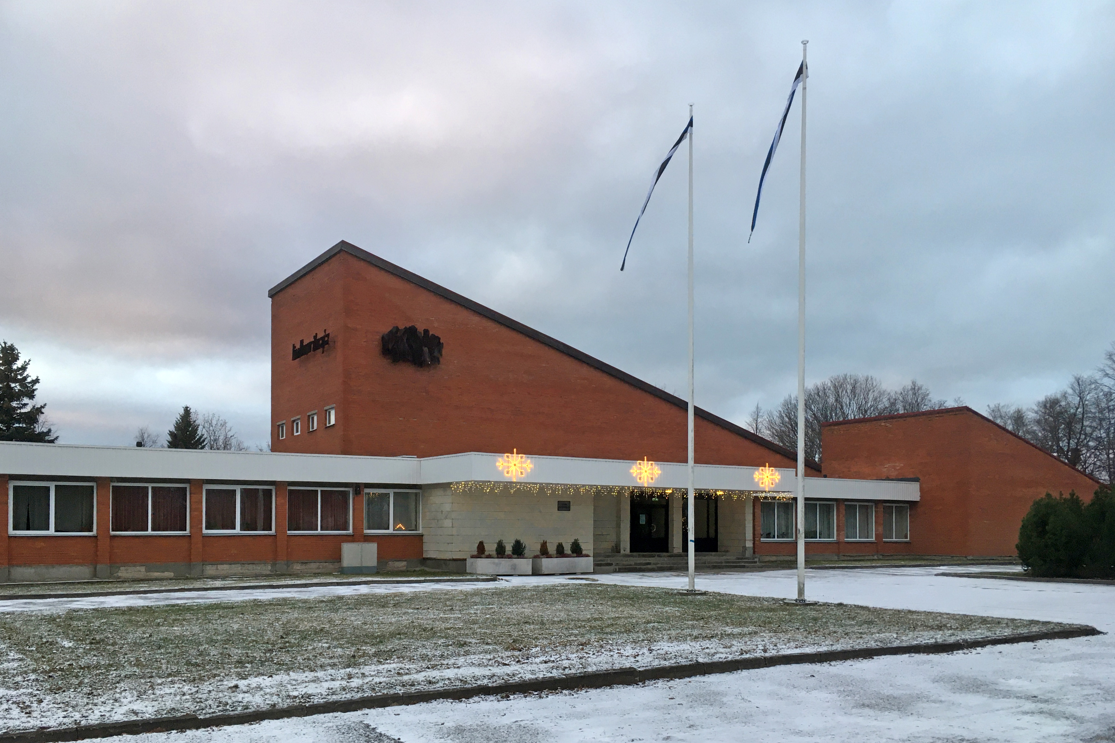 Народный дом посёлка Азери, Эстония